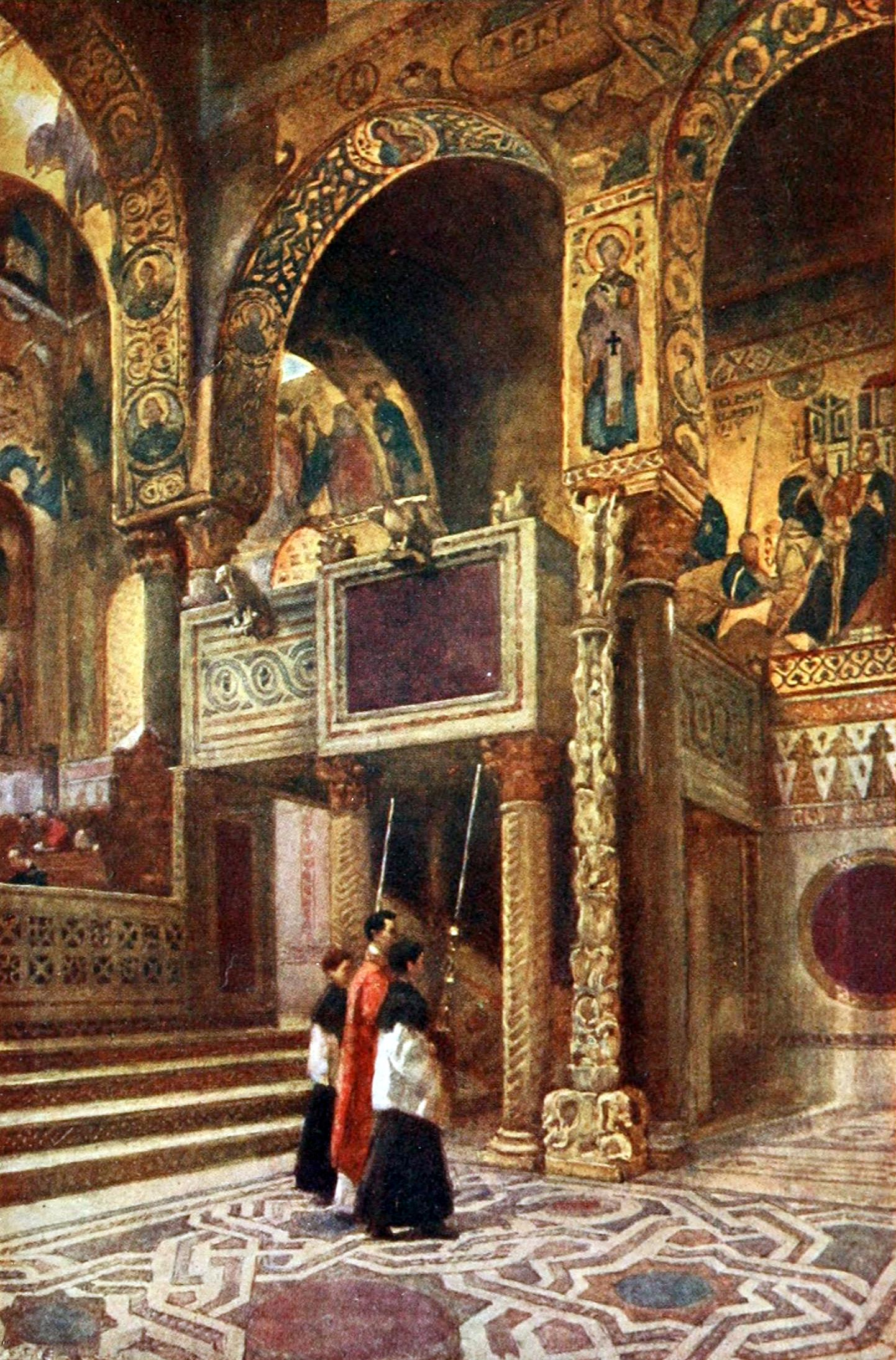 Palatine chapel in Palermo